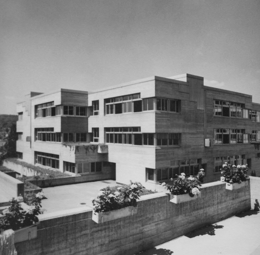 Bild des Förderer-Neubaus von 1967. Sicht von der Terrasse des Nachbargebäudes an die West- und Südfassade